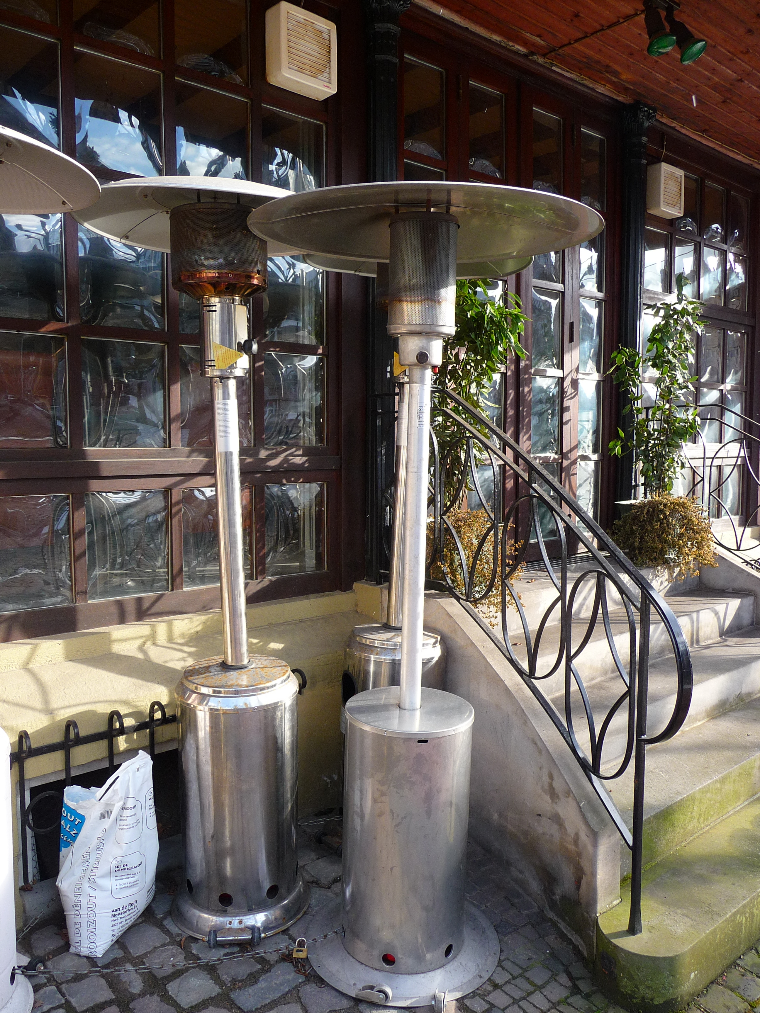 Terassenstrahler zum Einsatz im Außenbereich (Gastronomie)